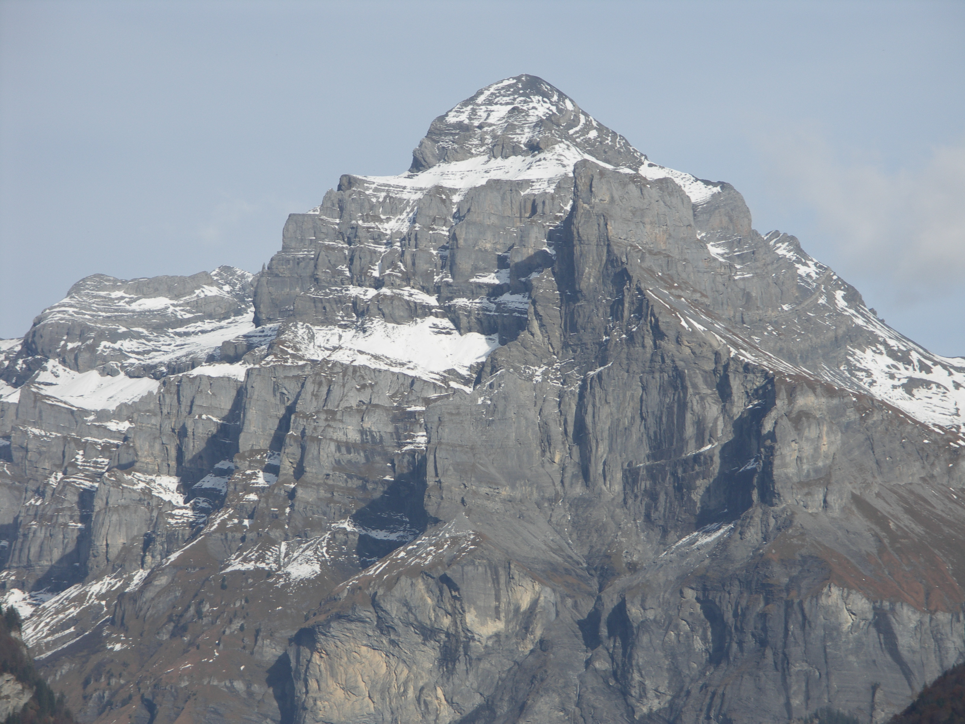 Vue du Pic de Tenneverge depuis Sixt